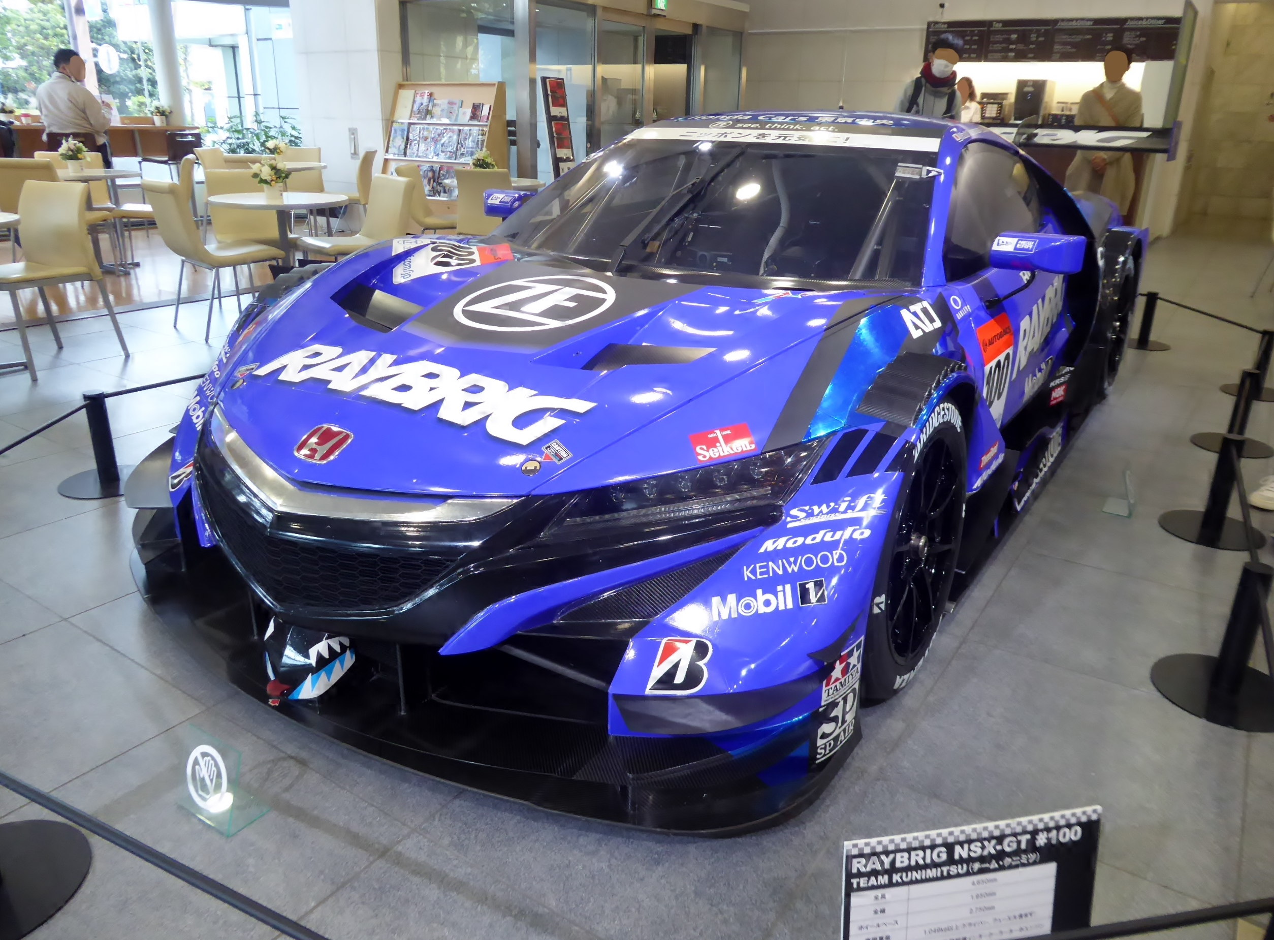 100号車RAYBRIG NSX-GTの2018年仕様をフロントから撮影。